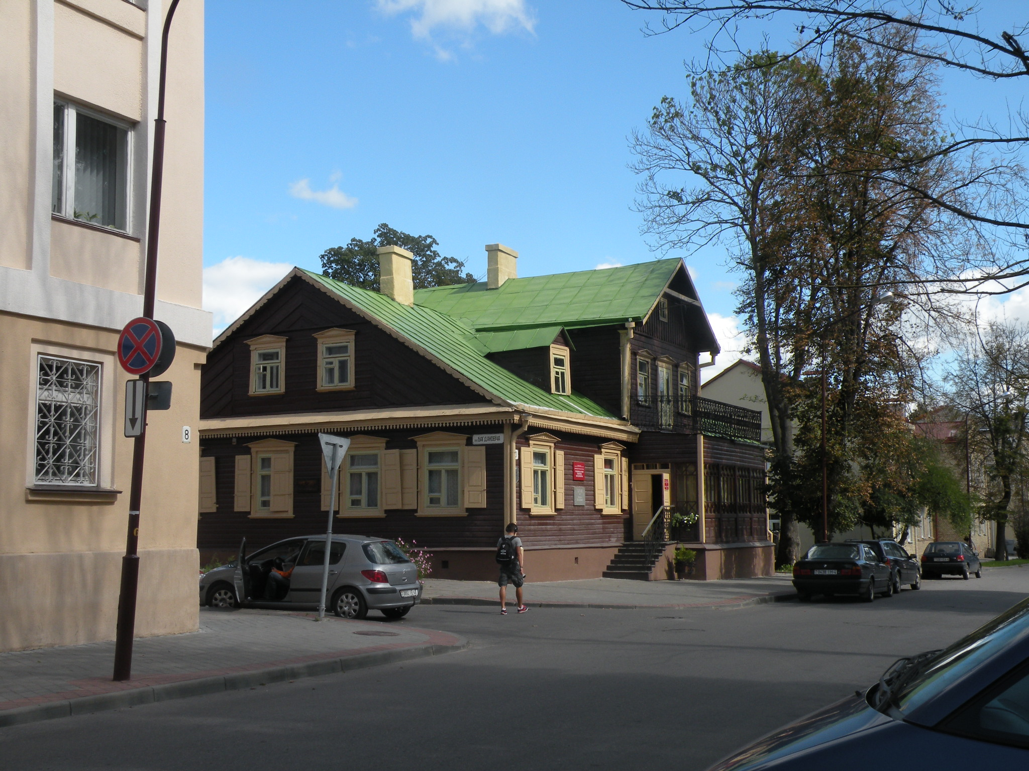 Гродненский музей Максима Богдановича. Дом №10 по ул. 1-го Мая, Гродно, Беларусь